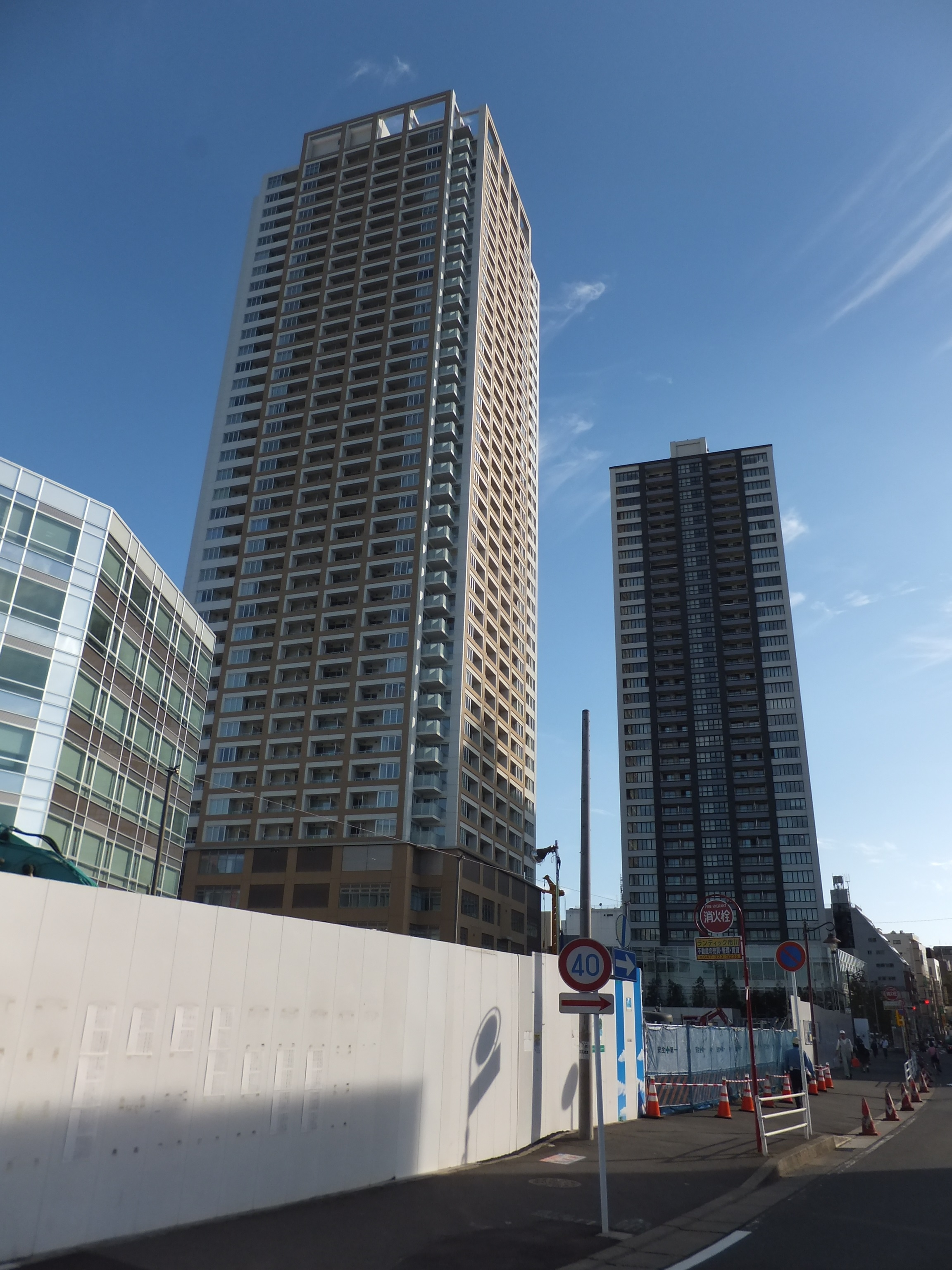 グランドターミナルタワー本八幡とガレリア・サーラ